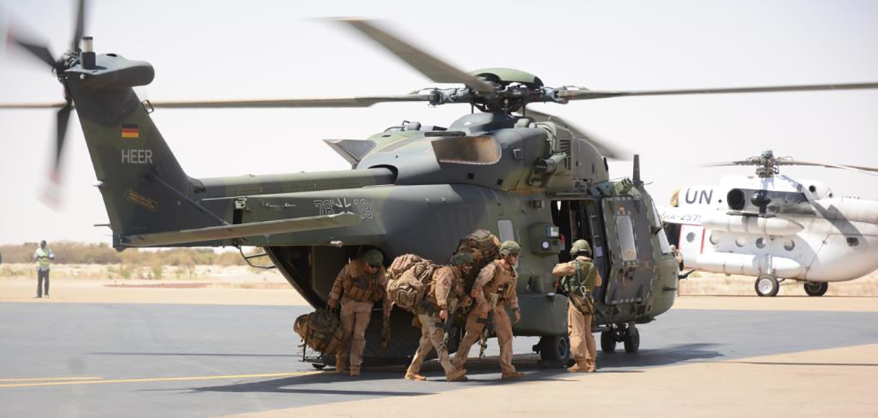 Personeel van de Long Range Reconnaissance Patrol Task Group wordt met verschillende middelen naar Timboektoe gevlogen, onder andere met Duitse NH-90’s die ook op Gao gestationeerd zijn.